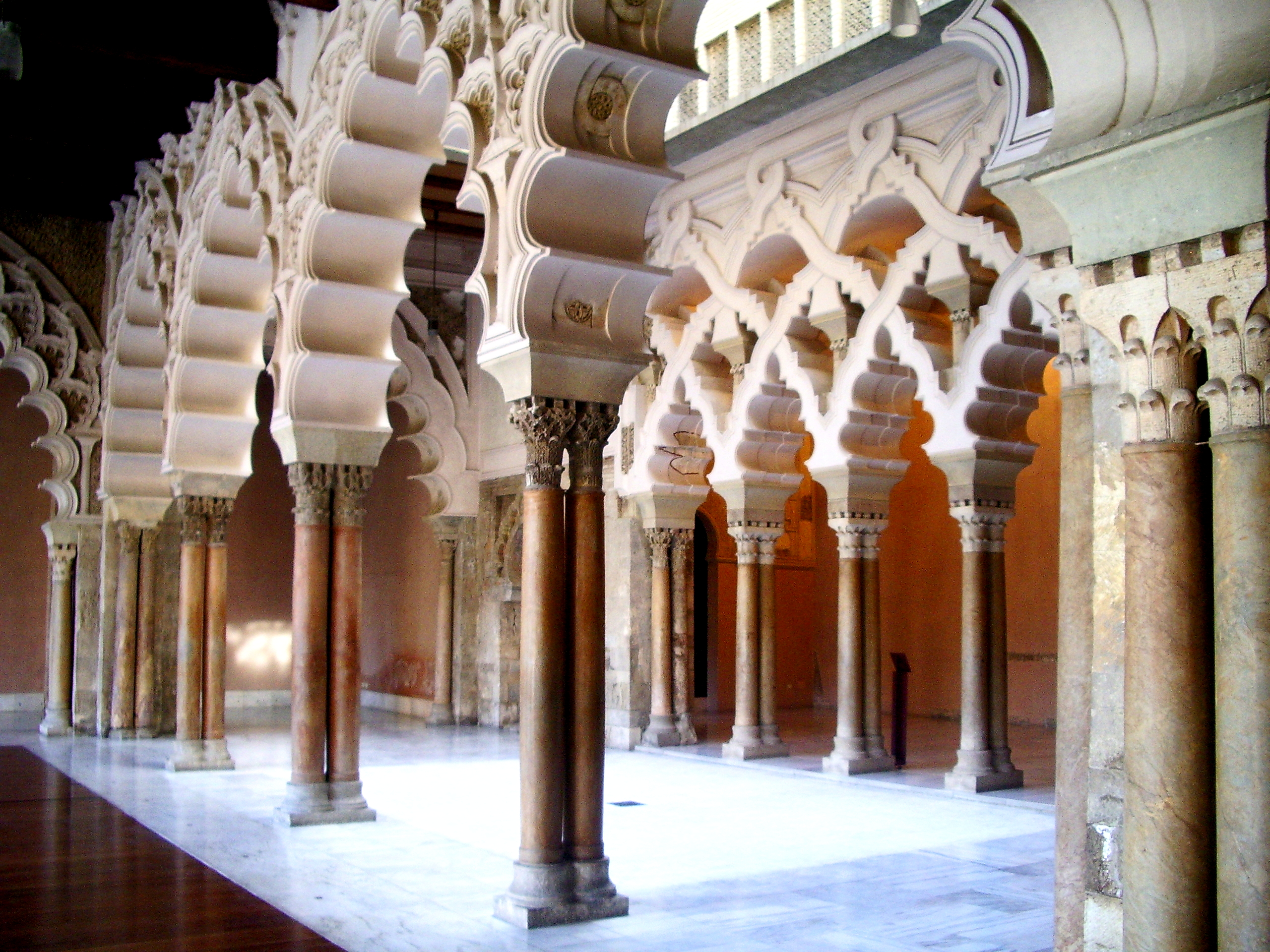 Palacio de La Aljafería. Vista de las salas principales del palacio taifal (S. XI)